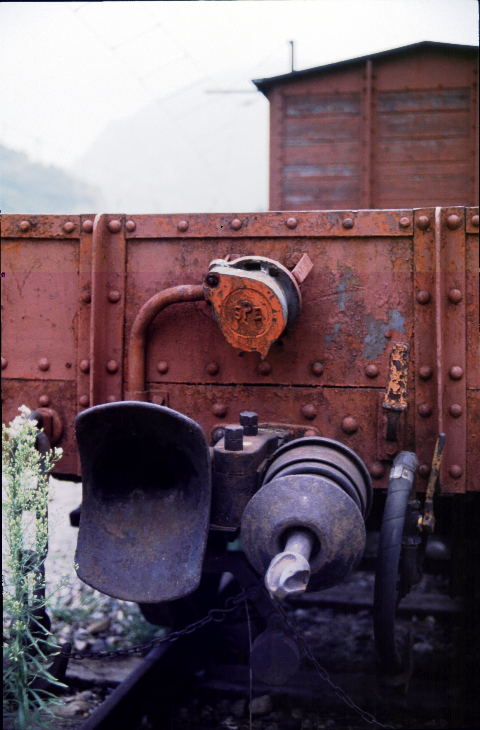 Kupplung Ligne de Cerdagne 1985